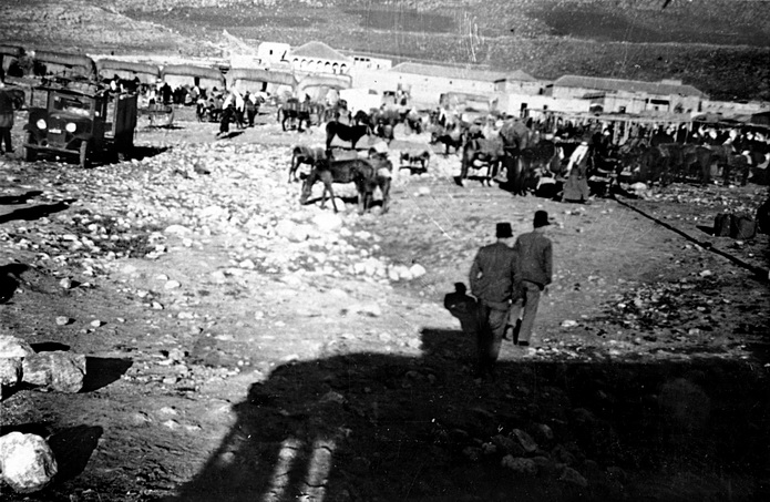 הכפר הערבי חלסה (אח"כ קרית שמונה); 1937 - / ליבלינג